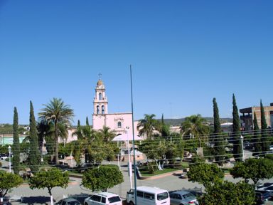 Plaza principal de Cocula Jalisco vista desde la Presidencia Municipal.